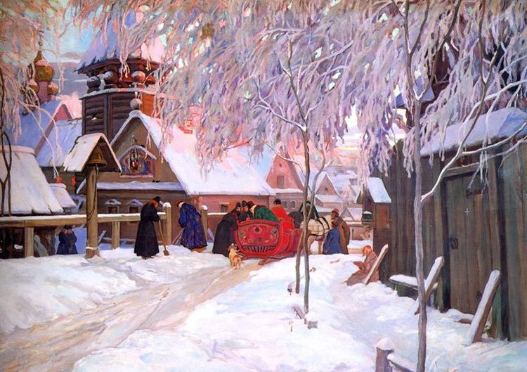 Приезд боярина в монастырь. 1912 ГРМ Горюшкин-Сорокопудов Иван Силыч